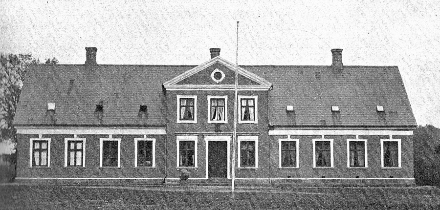 Brændegård er en lille hovedgård, som er dannet i 1588 af Henrik Rantzau til Rantzausholm, i 1672 indgik gården i det nyoprettede baroni Brahe-Trolleborg. Brændegård er nu en avlsgård under Brahetrolleborg Gods. Gården ligger ca. 8 km nordøst for Fåborg i Vester Åby Sogn, Sallinge Herred, Faaborg Kommune. Hovedbygningen er opført i 1880.